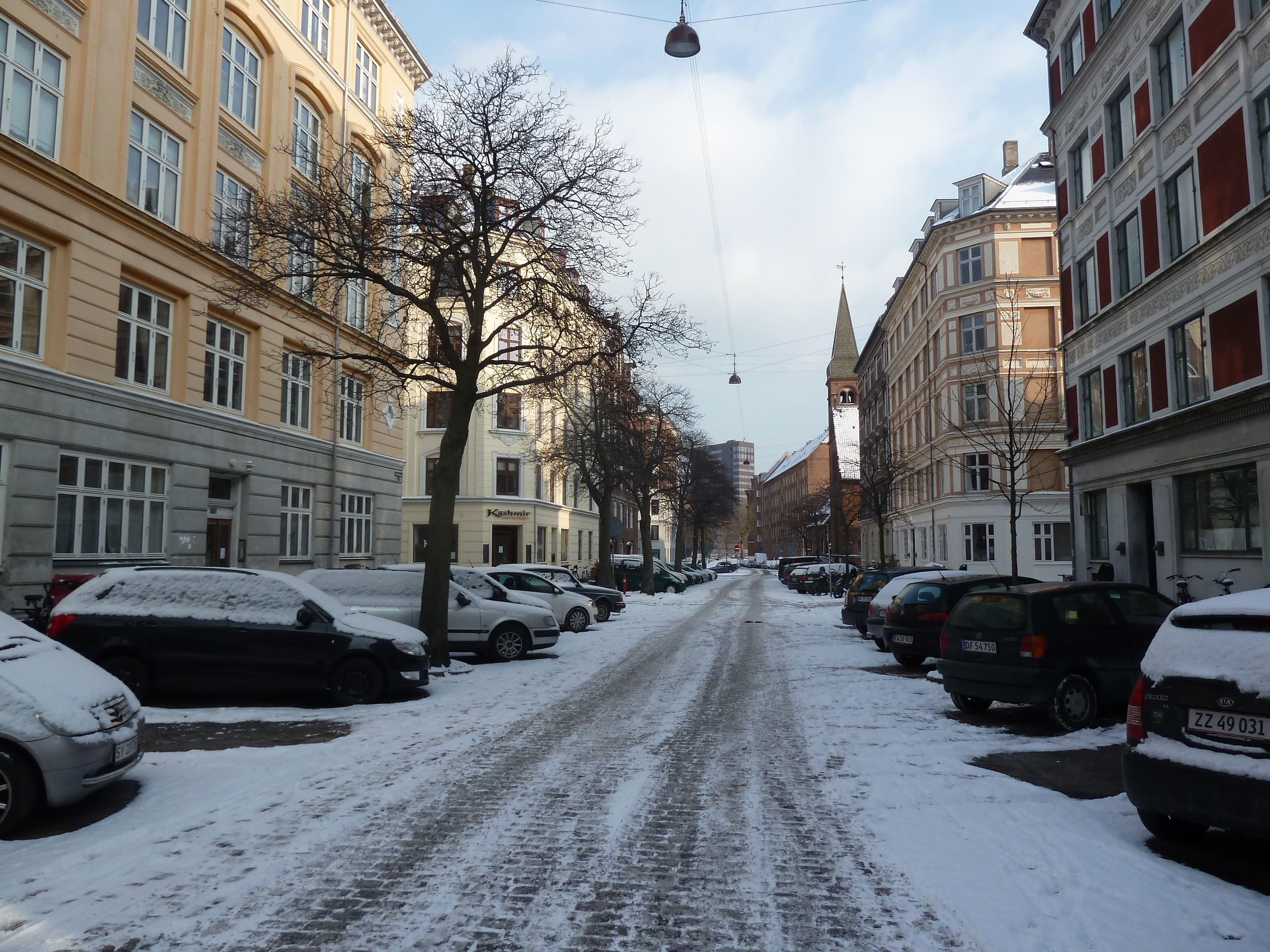 The street Willemoesgade in Østerbro in Copenhagen.